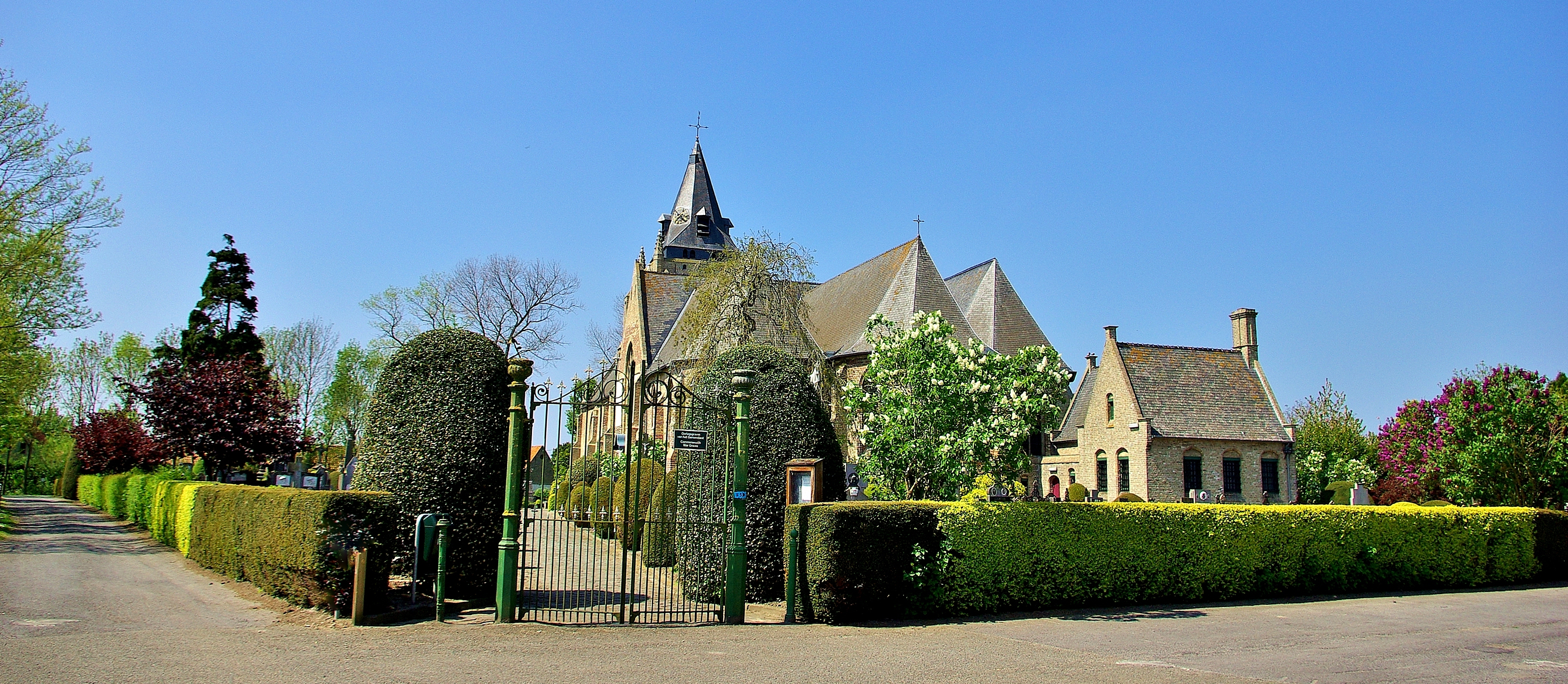 Houtem Kerkhoek Onze-Lieve-Vrouwhemelvaart parochiekerk